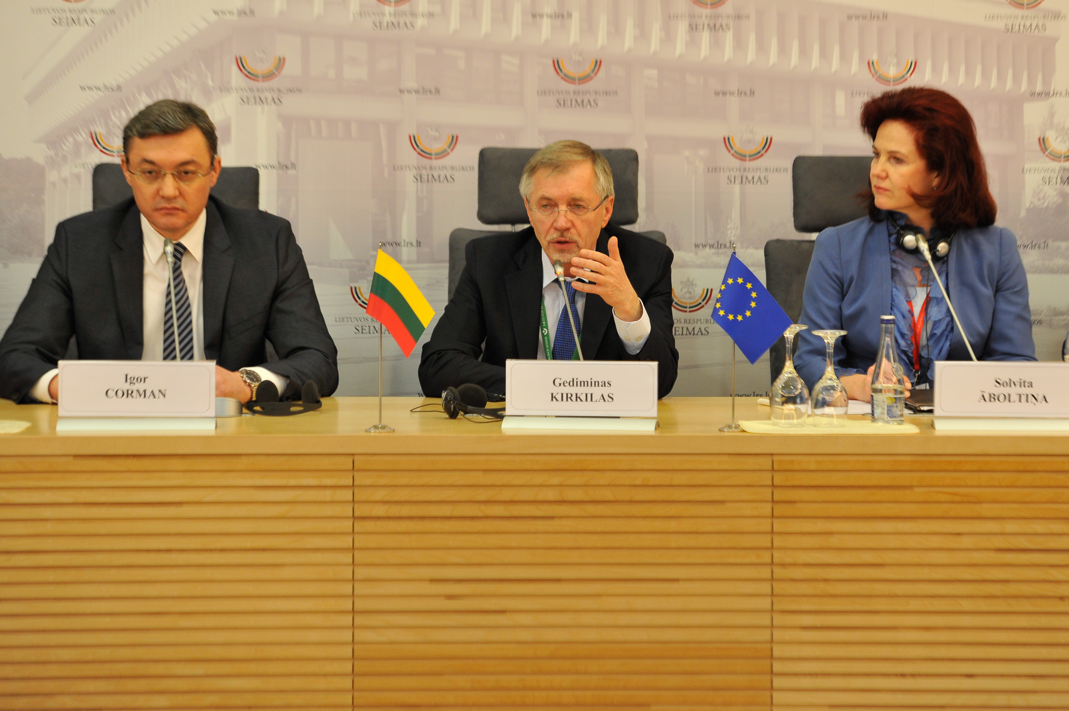 2014.gada 7.aprīlis. Saeimas priekšsēdētāja Solvita Āboltiņa Eiropas Savienbas nacionālo parlamentu spīkeru konferences ietvaros Viļņā piedalās preses konferencē par Austrumu partnerības jautājumiem. Foto: Reinis Inkēns, Saeimas Kanceleja Izmantošanas noteikumi: saeima.lv/lv/autortiesibas